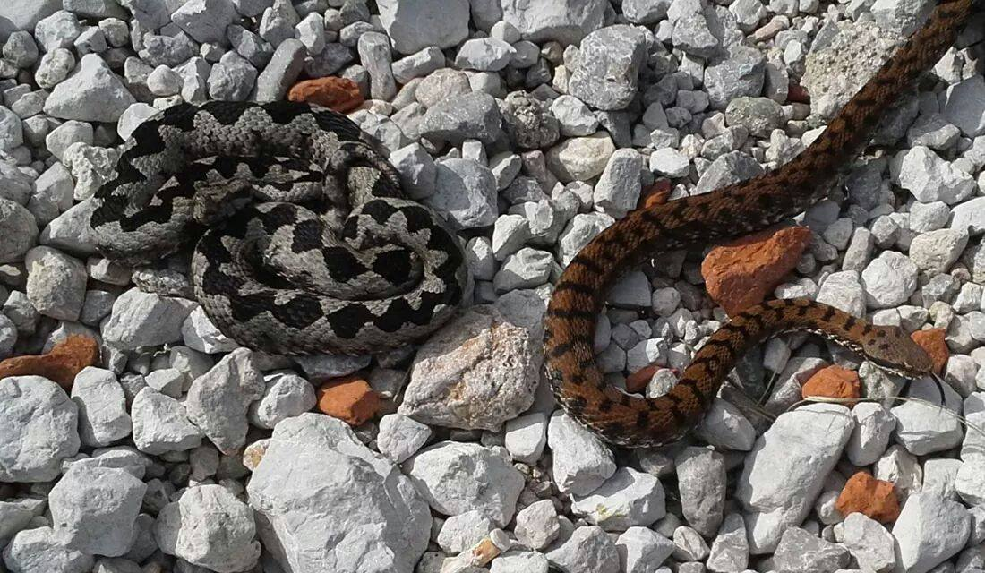 Modras (vipera ammodytes) in laški gad (vipera aspis) na pogorju Stola.